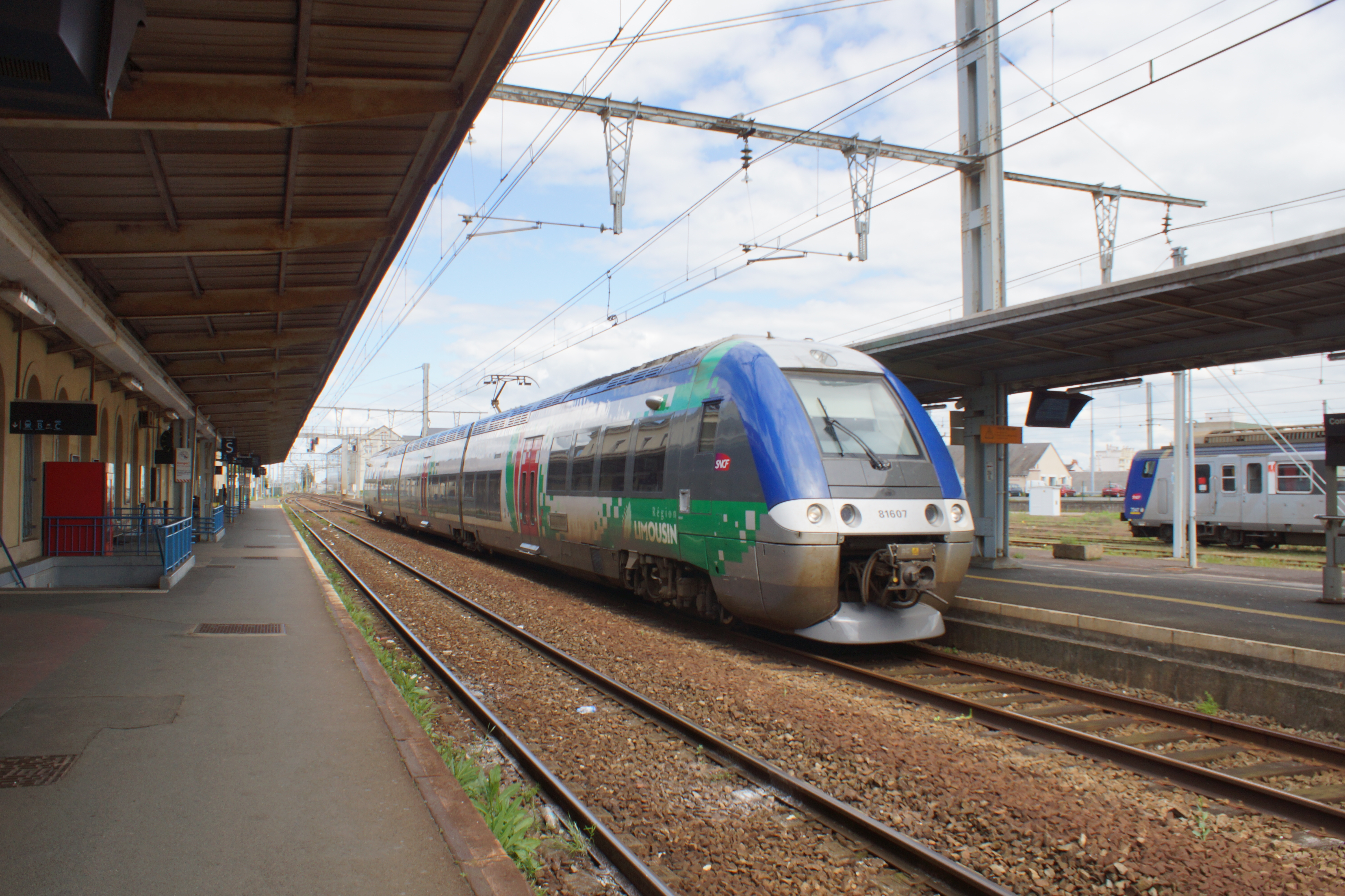 Intérieur de la gare, avec desserte TER, automotrices bimode B 81500